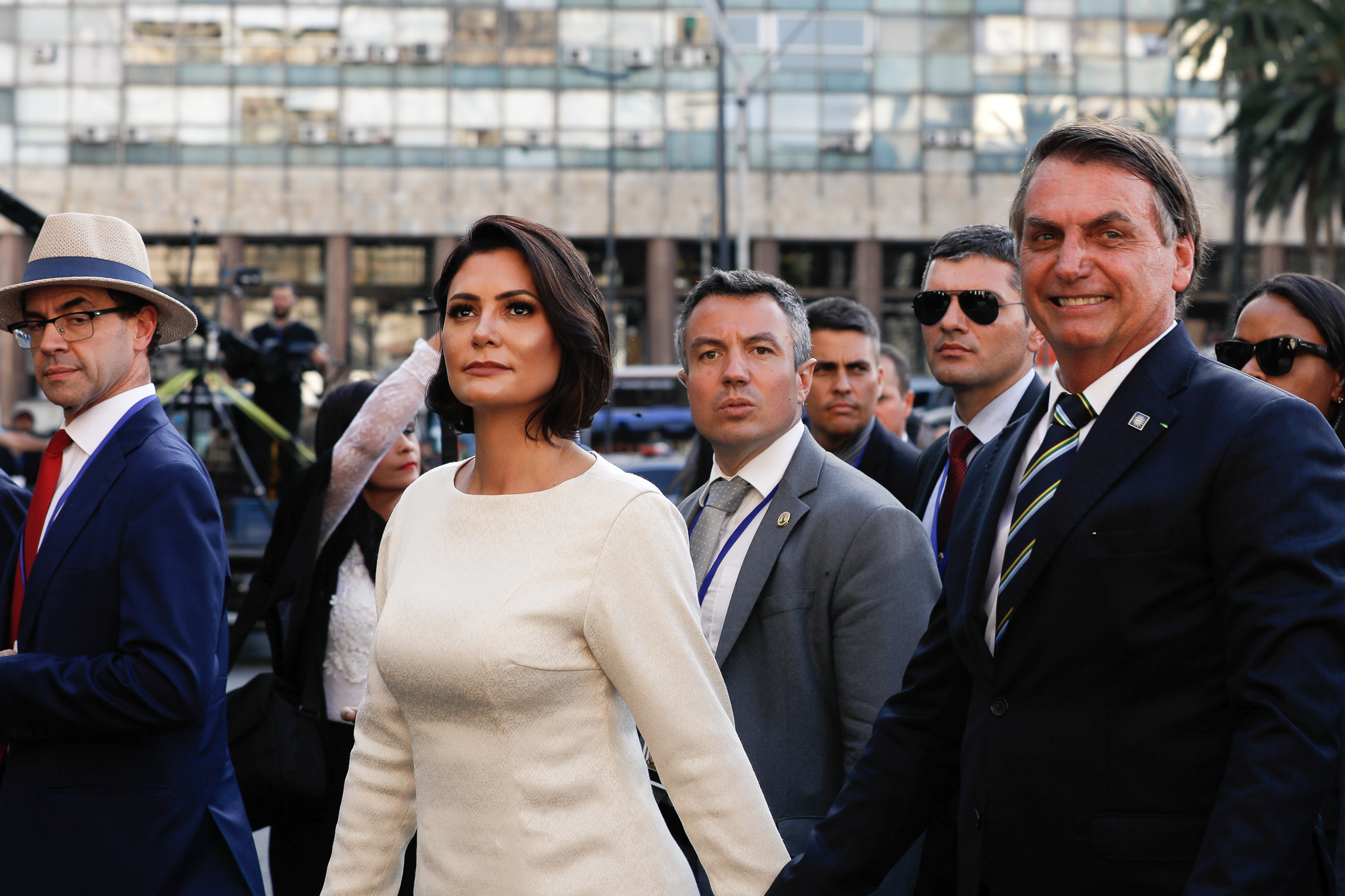 (Montevidéu - Uruguai, 01/03/2020) Cerimônia de Transmissão de Mandato Presidencial.